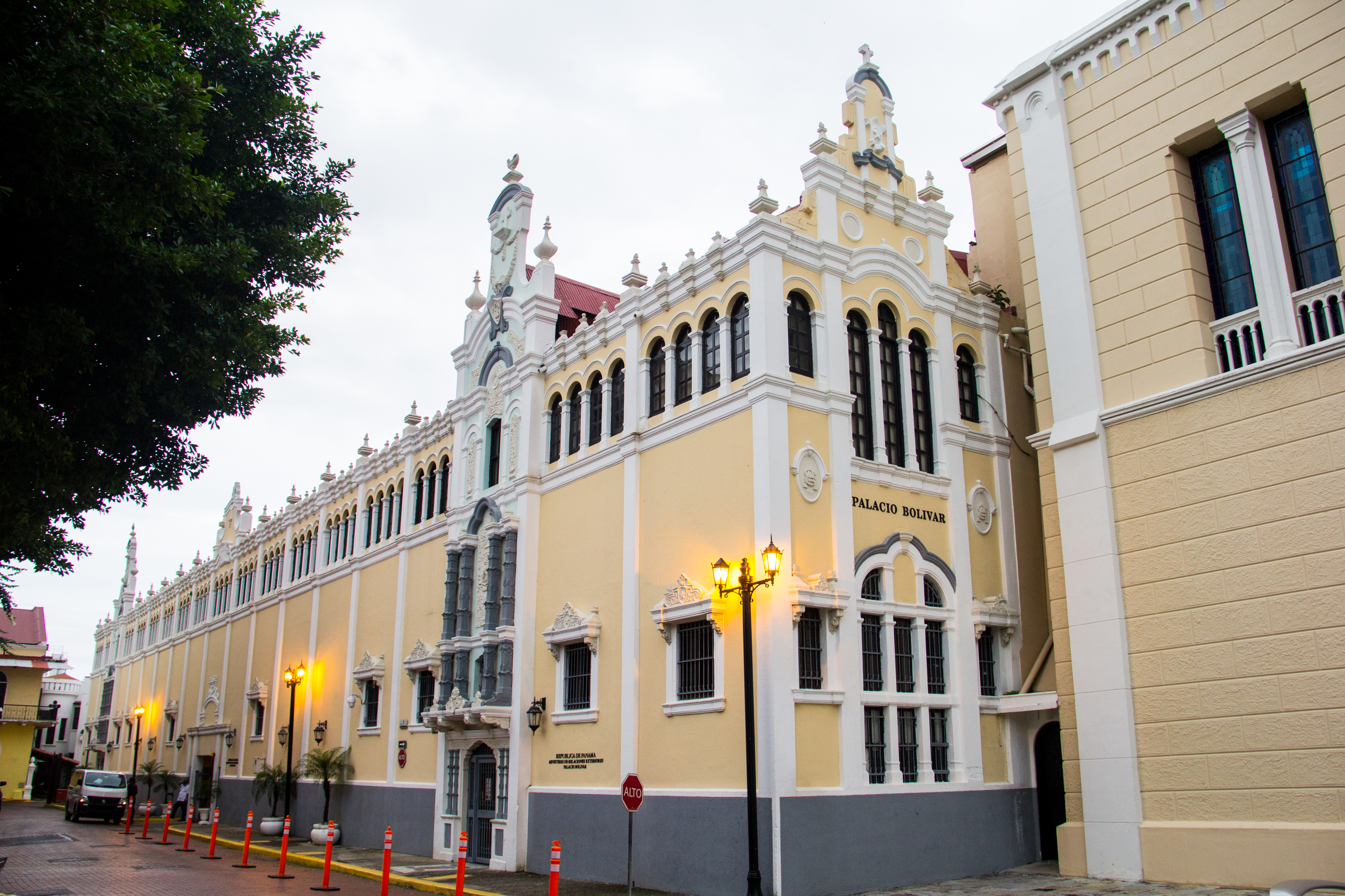 Tras la fundación de la nueva ciudad de Panamá, se construye el templo y convento de los Franciscanos frente a la playa de Santo Domingo. Luego de la independencia a España, la anexión voluntaria de Panamá a la Gran Colombia y la promulgación del Congreso de Cúcuta, el gobierno central de Nueva Granada expropió los terrenos. Luego fue cuartel militar para formar el Batallón del Istmo que apoyó en las Batallas de Junín y Ayacucho consolidando así la independencia de Perú en 1824. También funcionó como hospital para extranjeros. Posteriormente fue sede de diversos colegios, como el Nacional Balboa (1892-1899), de La Salle (1910-1952), San Agustín (1953-1959) y el Instituto Bolívar (1959-1999), que compartió espacio con el Comercial Bolívar (1958) y el Primer Ciclo América (1961-1972). Actualmente El Palacio Bolívar, es la sede del Ministerio de Relaciones Exteriores desde el año 2003; este edificio tiene una arquitectura ecléctica de unos 10 mil metros cuadrados.